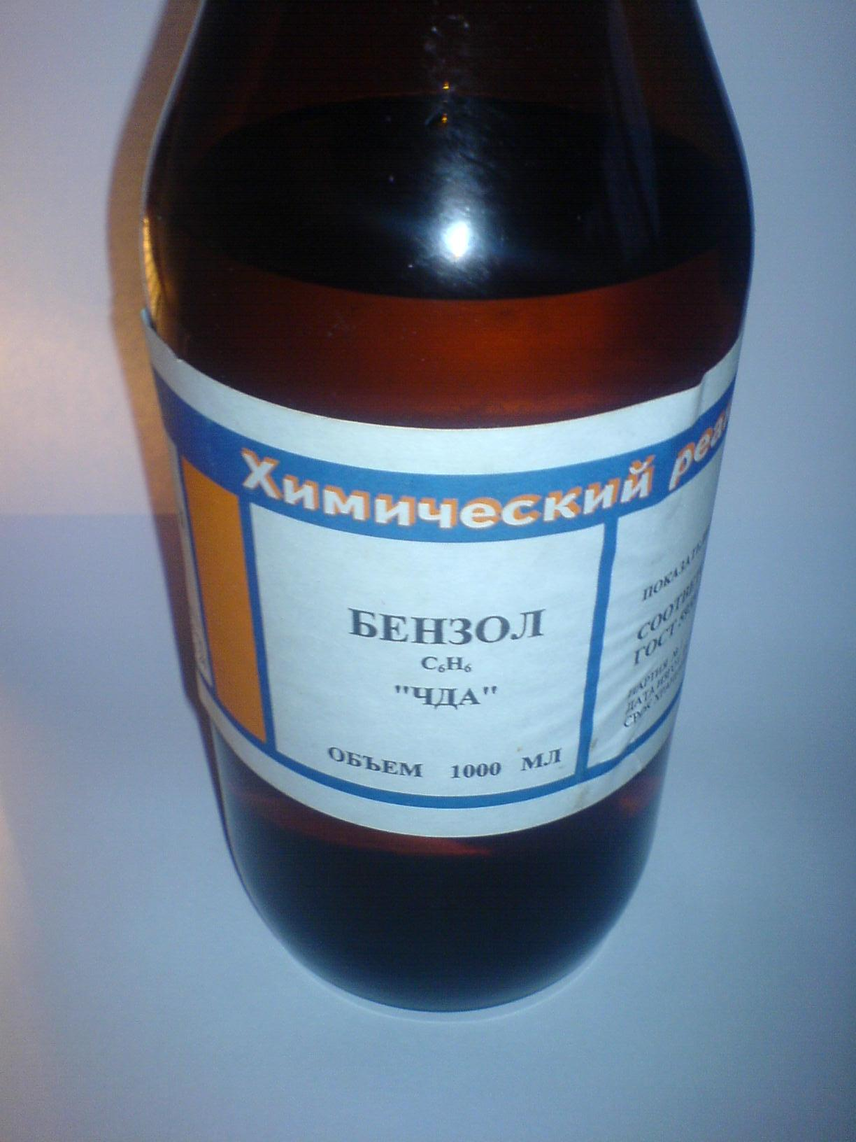 Ёмкость с бензолом